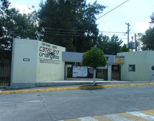 CBTis 217